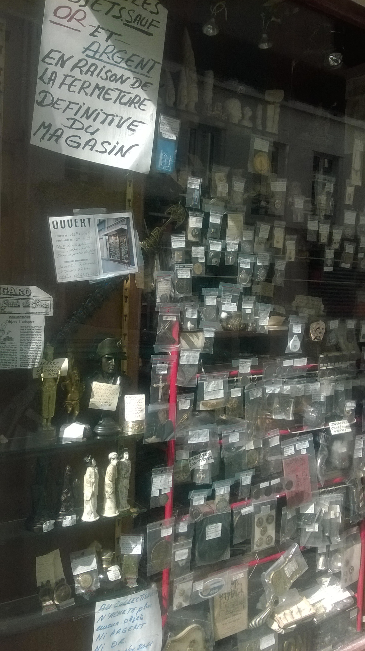 rue Brey Paris XVII échoppe "au Collectionneur"